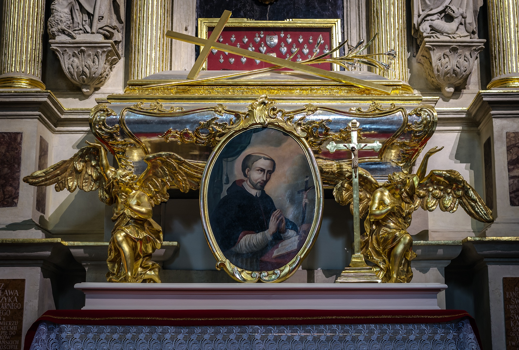 Kościół Bożego Ciała w Krakowie - wnętrze (zabytek nr A-24 oraz A-191/M)